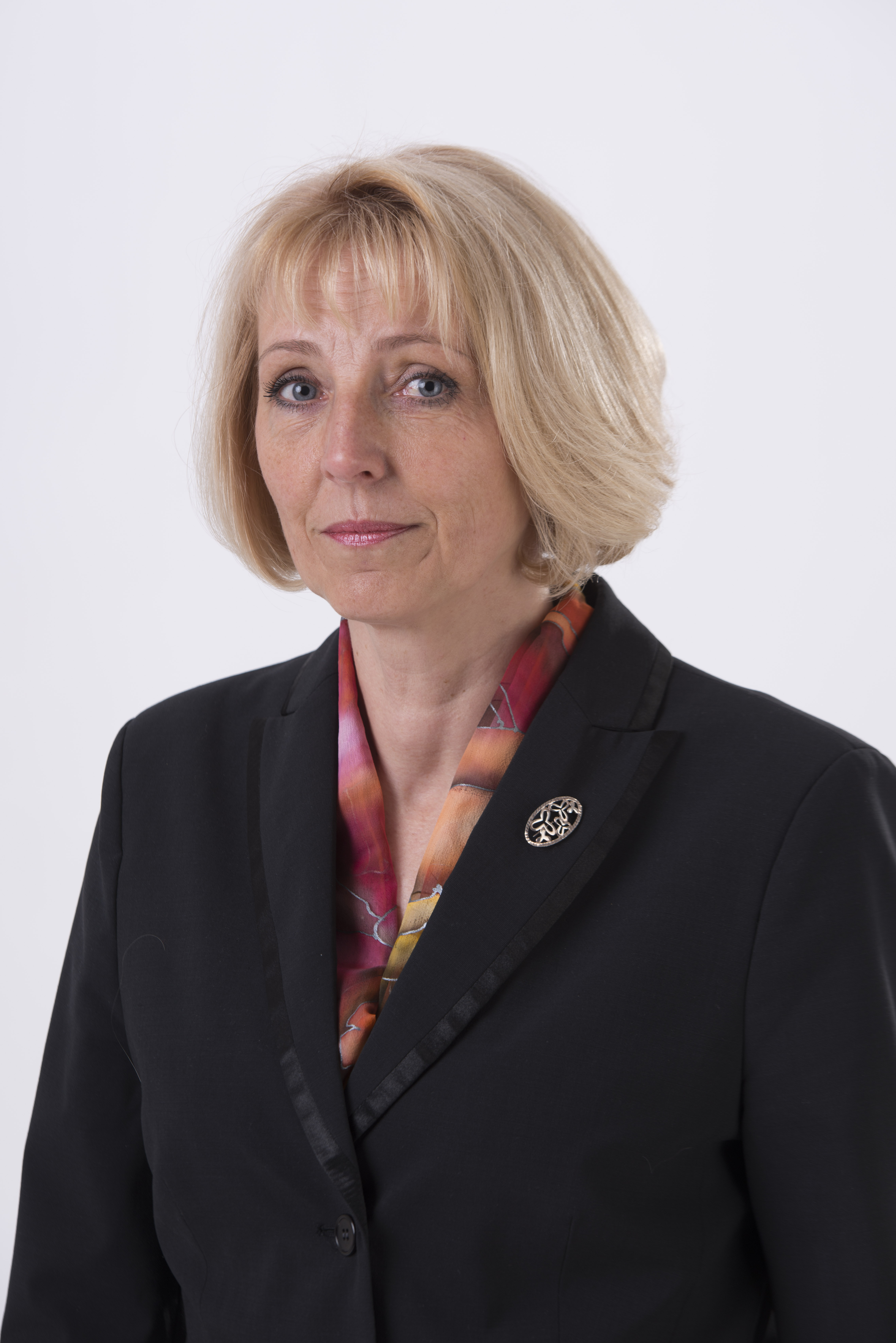 11.Saeimas deputāte Gunta Liepiņa. Foto: Reinis Inkēns, Saeimas Kanceleja Izmantošanas noteikumi: saeima.lv/lv/autortiesibas